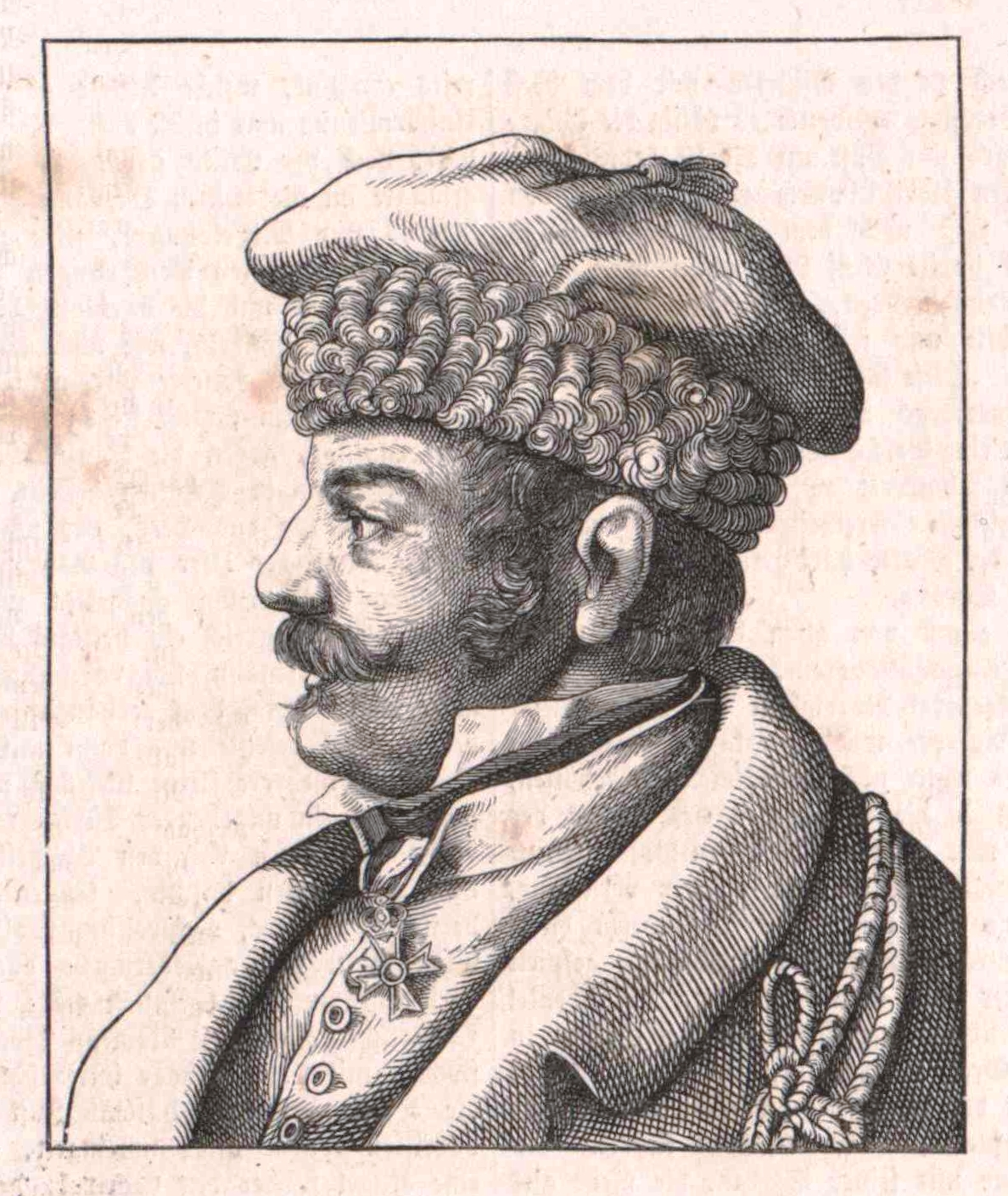 Karl von Normann-Ehrenfels, * 14. September 1784 in Stuttgart, † 15. November 1822 in Messolongi